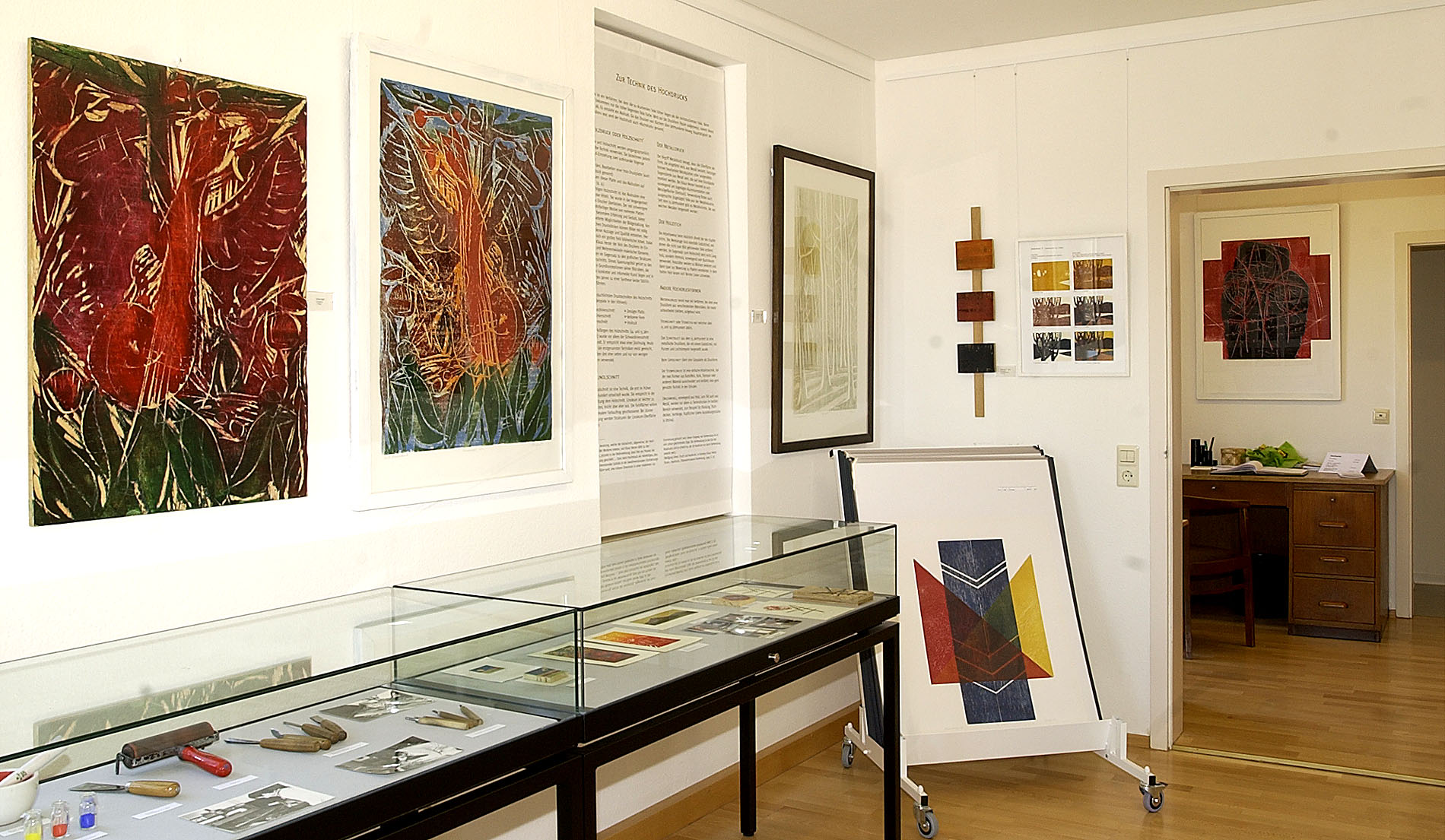 Das Bild zeigt den ersten Raum im Holzschnitt Museum Klaus Herzer in Öschingen, Baden-Württemberg